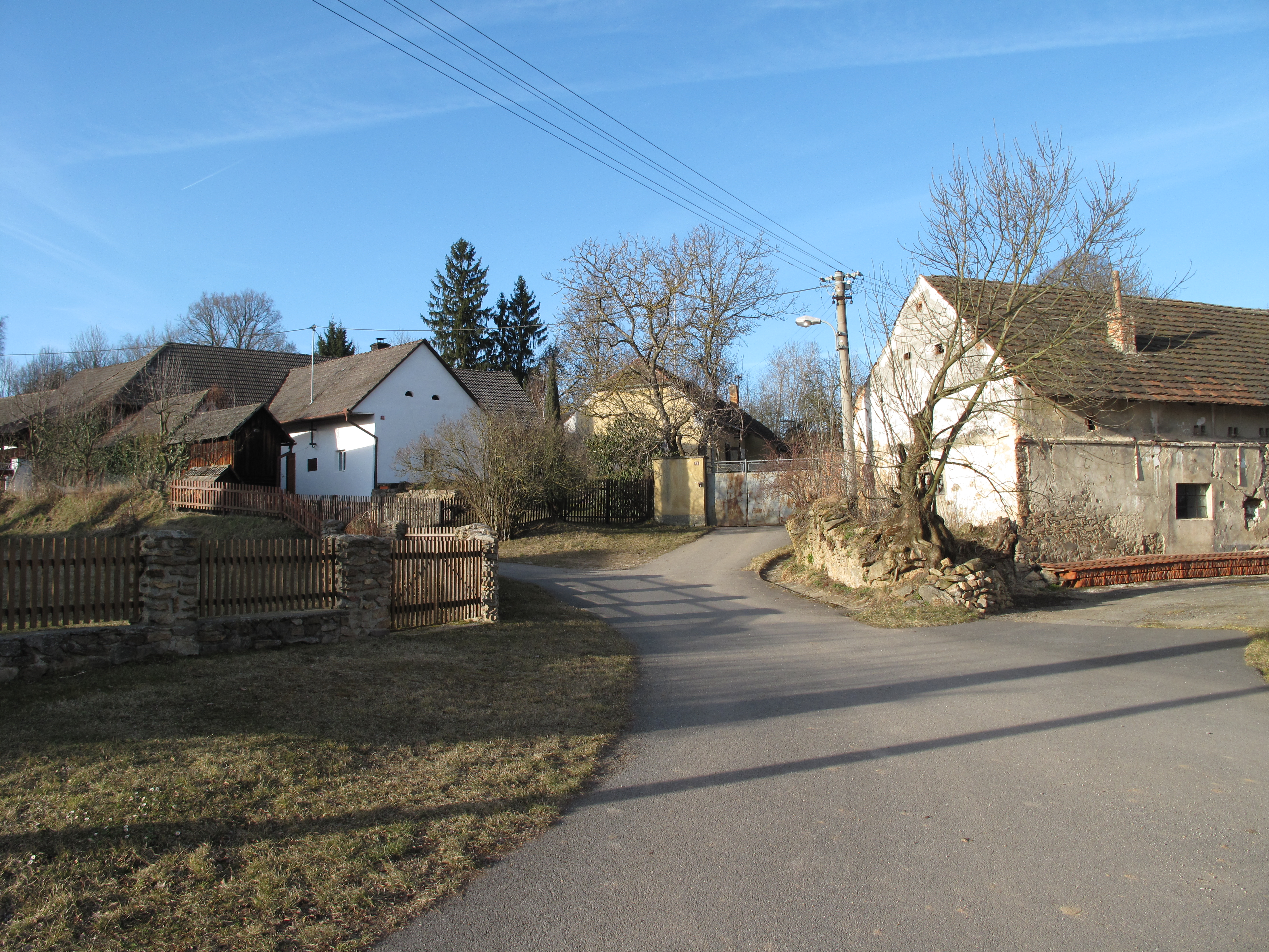 Rozcestí v Netonicích. Okres Strakonice, Česká republika.